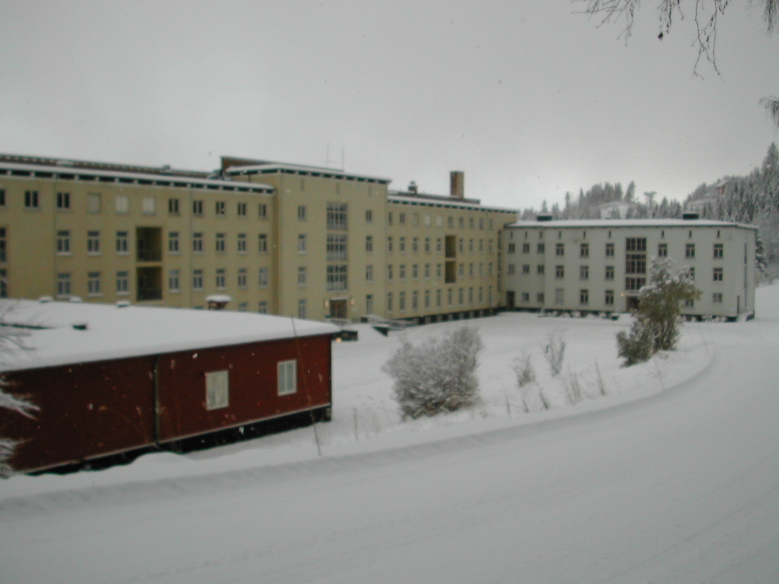 Ringvål sykehjem utenfor Heimdal i Trondheim.